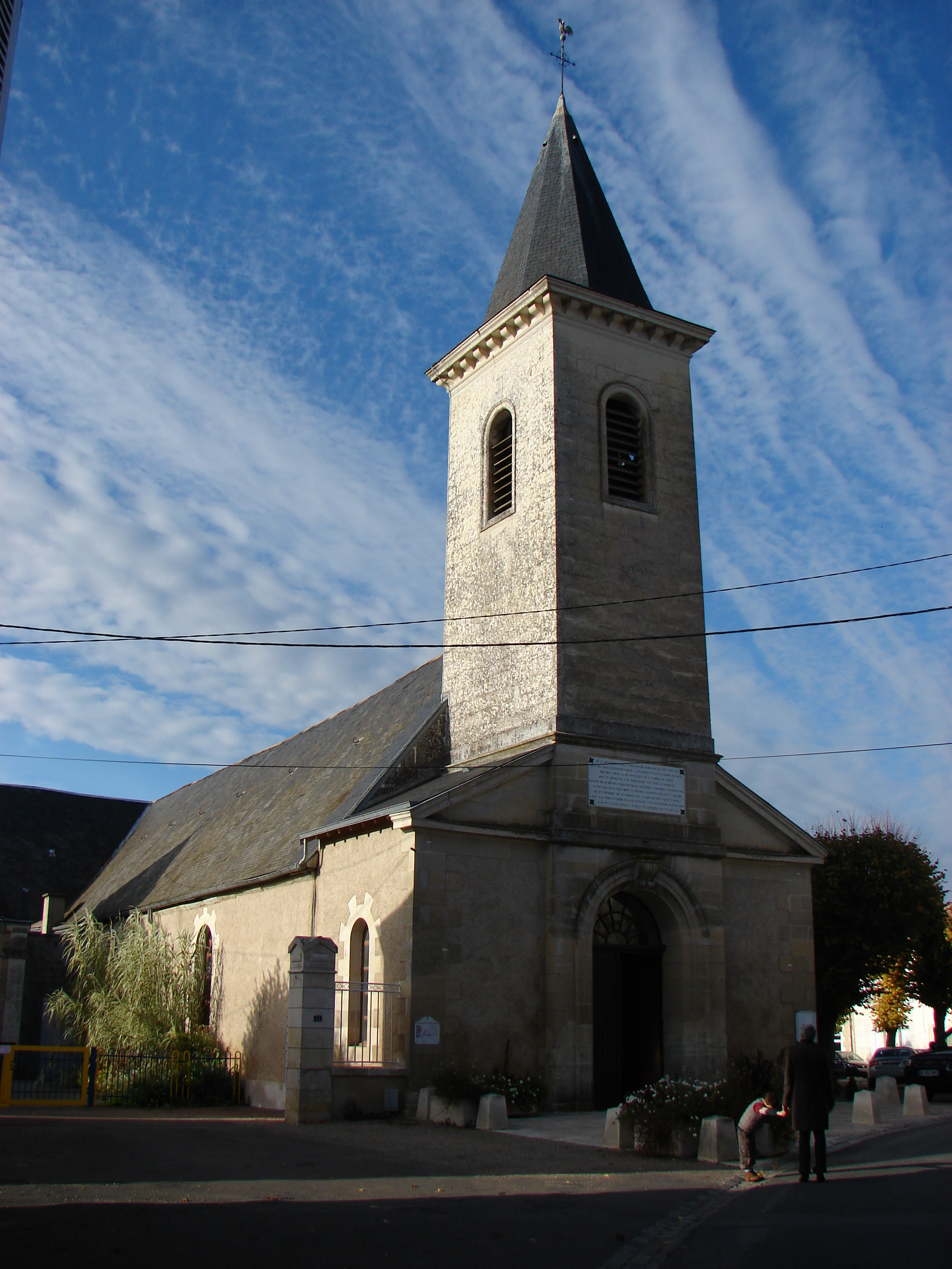 Église Eglise Ste Croix de Migné-Auxances